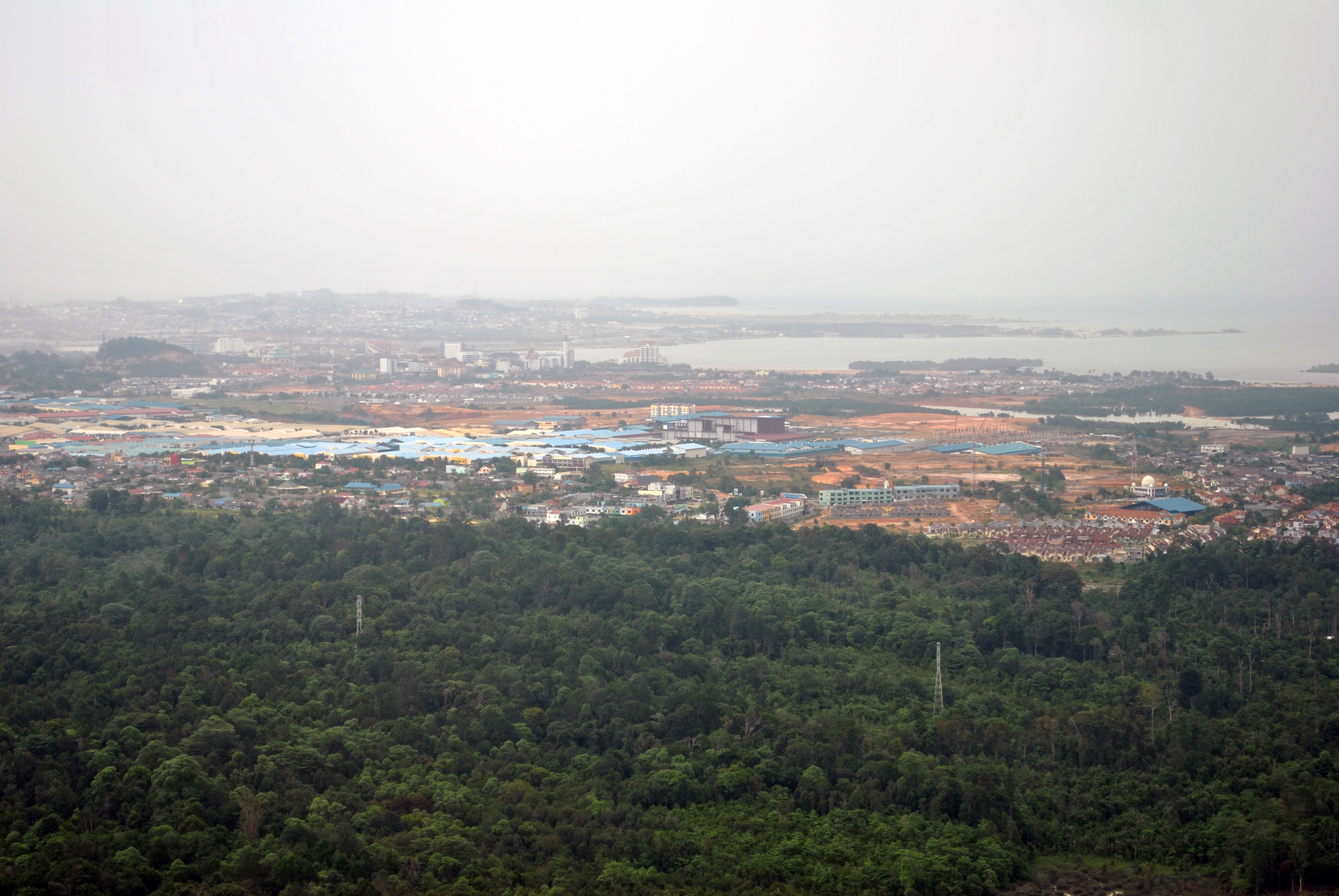 Batam Centre